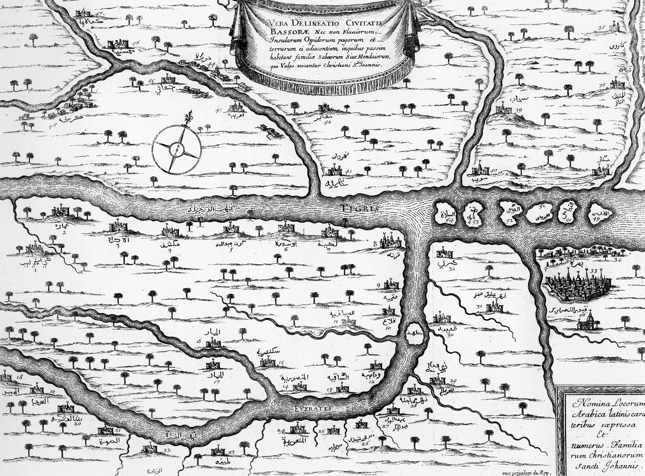 Gravure du XVIIe siècle représentant le Tigre et l'Euphrate.